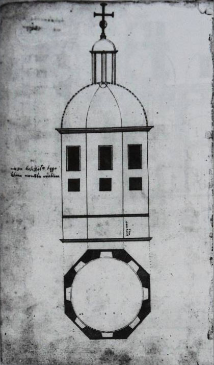 Беларуская (тарашкевіца): Нясьвіж (Niaśviž). Фарны касьцёл (Fara), купал